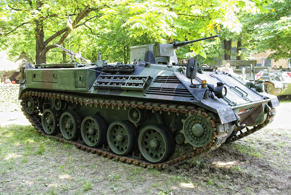 Schützenpanzer SPz A1 Saurer bei "Auf Rädern und Ketten 2011" im HGM Wien